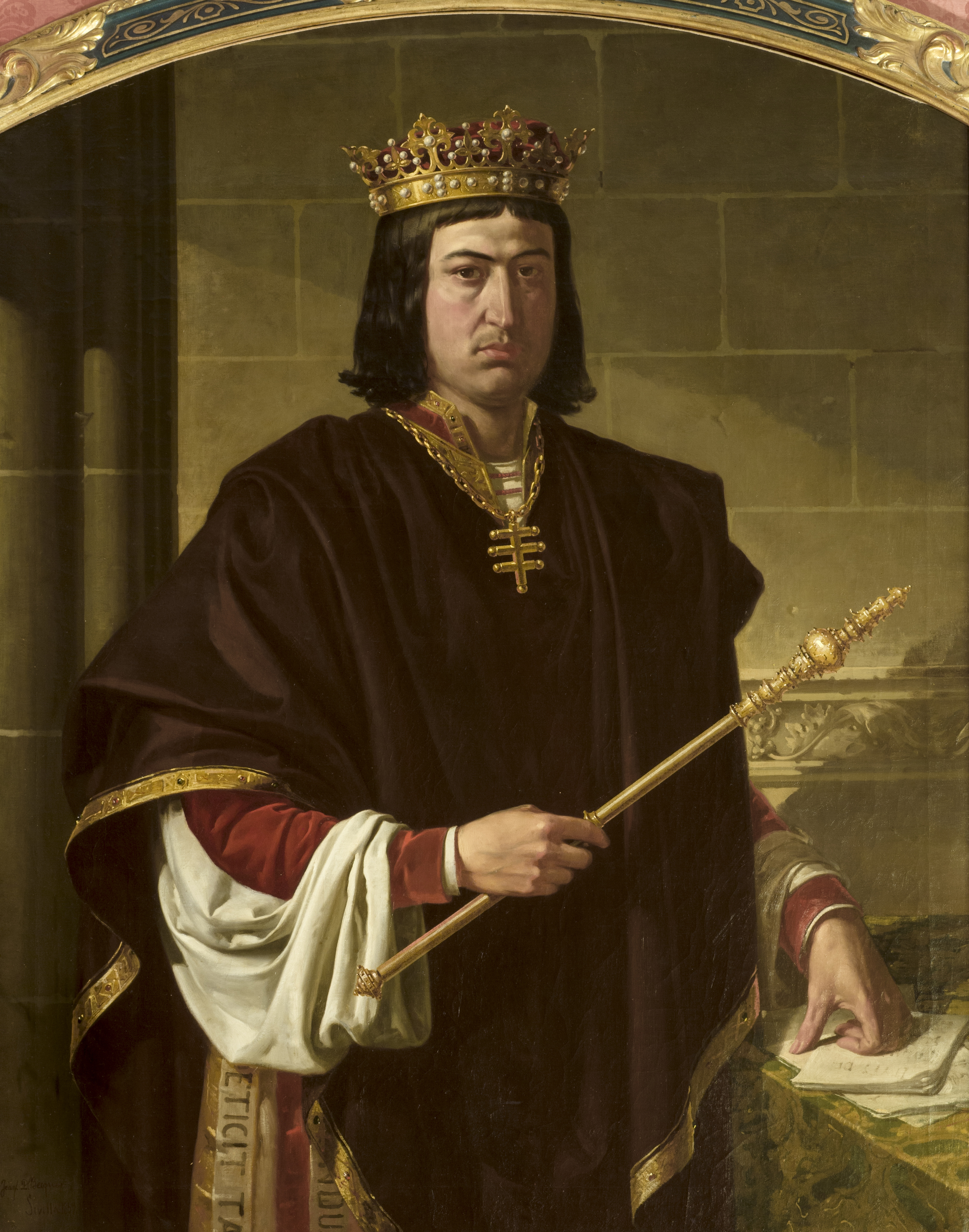 Retrato imaginario del rey Fernando II de Aragón (1452-1516), apodado el Católico e hijo del rey Juan II de Aragón y de la reina Juana Enríquez y esposo de la reina Isabel I de Castilla.